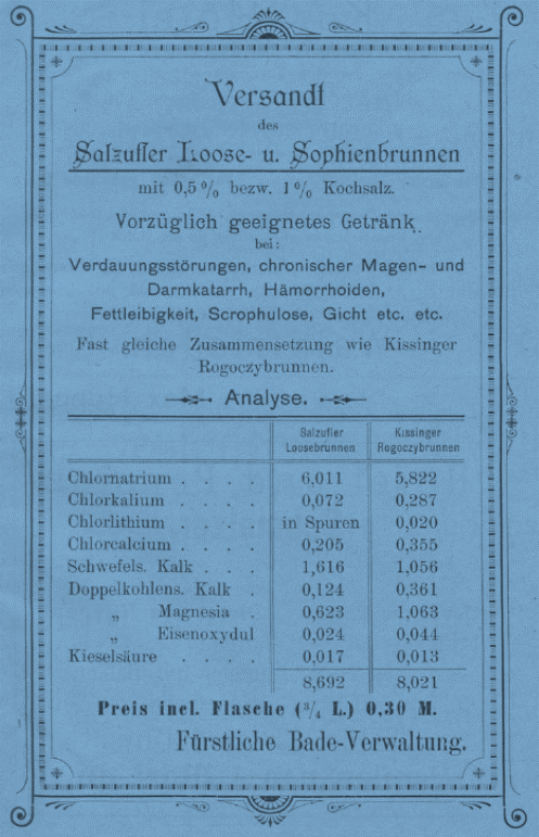 Anzeige der Fürstlichen Bade-Verwaltung Salzuflen 'Loose- und Sophienbrunnen' vom April 1899